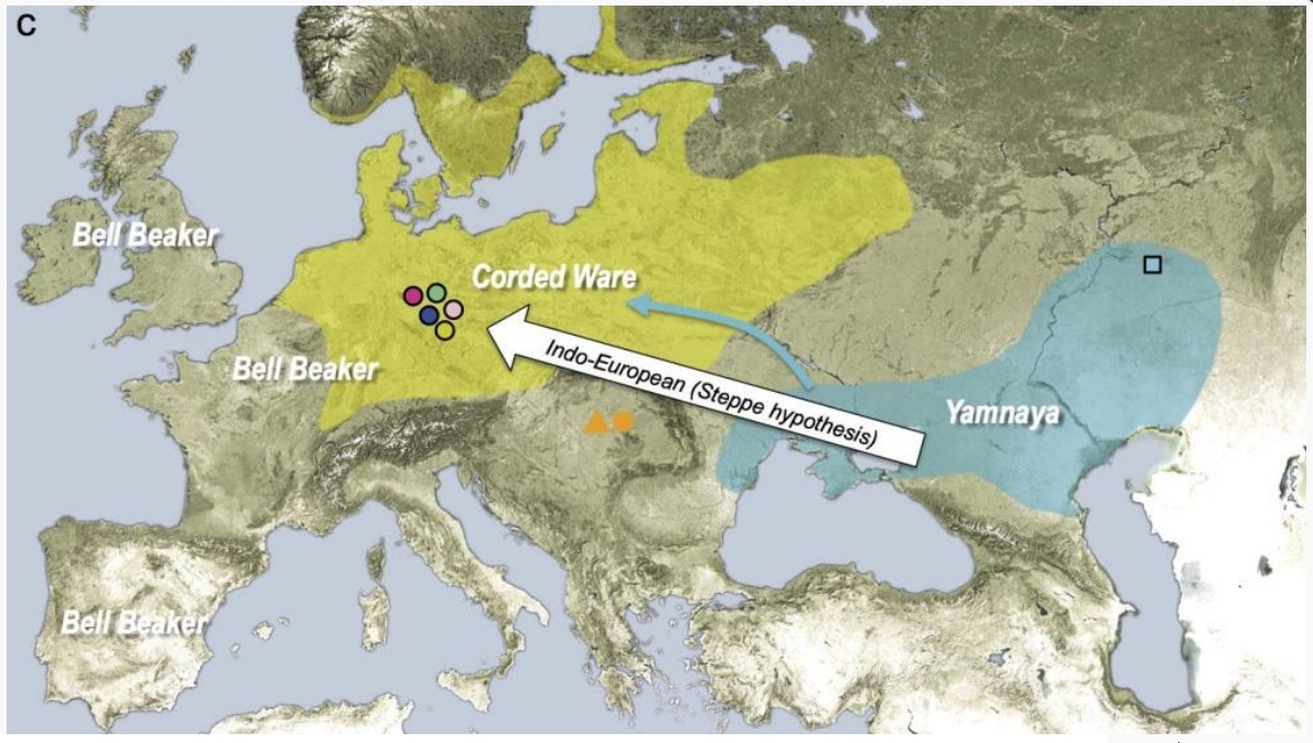 Индоевропейцы, ямная культура.